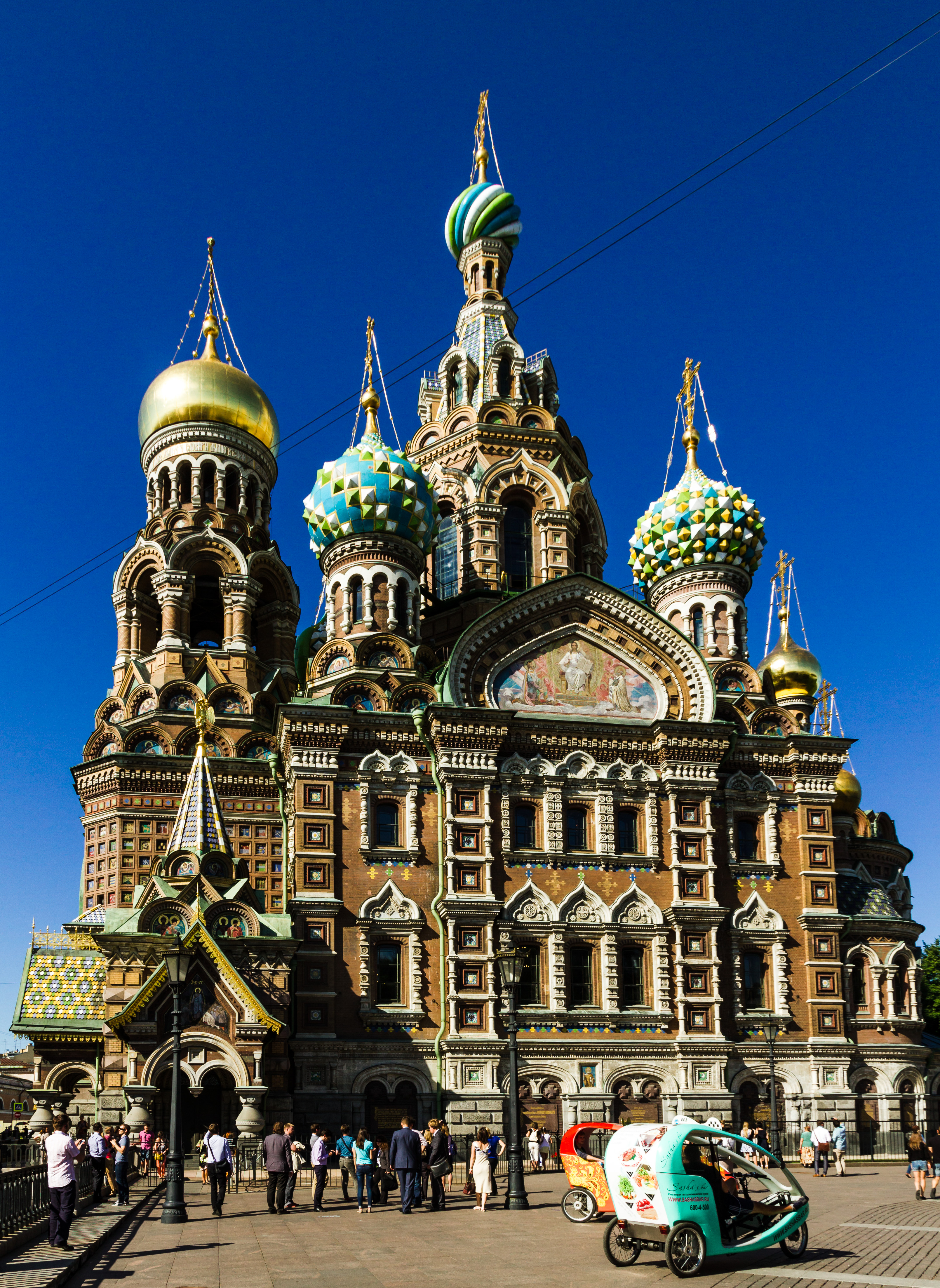 Auferstehungskirche